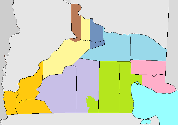 Departamentos de la provincia de Río Negro coloreados según el circuito electoral al que pertenecen desde 2013 Alto Valle Oeste Alto Valle Centro Alto Valle Este Valle Medio Valle Inferior Atlántico Serrano Andino